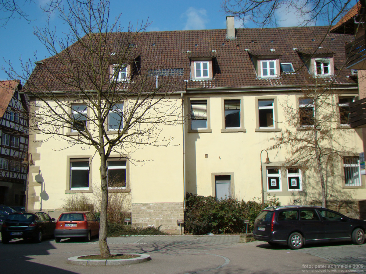 Historisches Diakonat, Bahnhofstr.10 in Eppingen